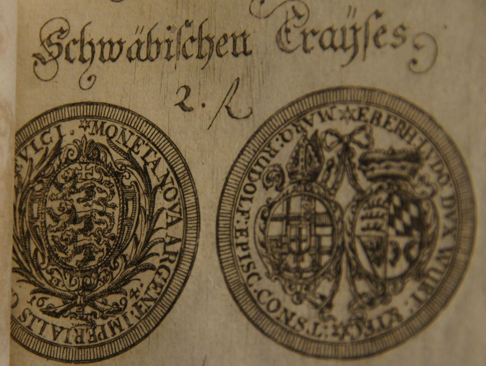 Abbildung einer 2-Gulden-Münze des Schwäbischen Reichskreises. Text Wappenseite des Kreises: "MONETA ARGENT. IMPWERIALIS CIRCULI SUEVICI". Text Wappenseite der kreisausschreibenden Fürsten: "EBERH. LUDO. DUX WIRT & TEC. MARQ. RUDOLF.EPISC.CONST"